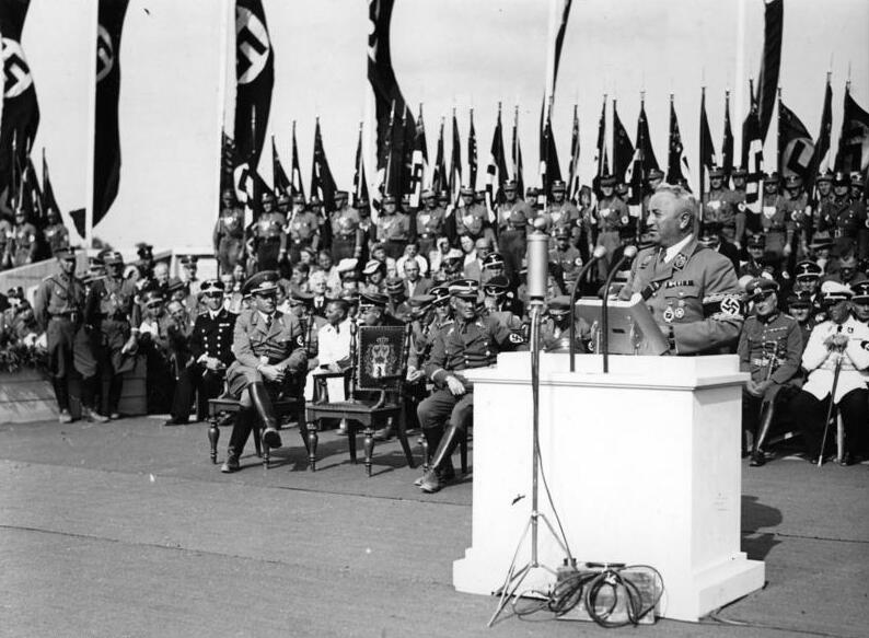 Berlin, Robert Ley bei Grundsteinlegung für Siedlung Scherl: Feierliche Grundsteinlegung zu der grossen Wohnsiedlung Charlottenburg-Nord [in Berlin]. Reichsorganisationsleiter Dr. Ley [Robert] spricht. Dahinter von links nach rechts: Prof. Speer [Albert] und Oberburgermeister Dr. [Julius] Lippert. Fot. Ho. 1.8.39 9820-39 Abgebildete Personen: Ley, Robert: Reichsorganisationsleiter, Deutsche Arbeitsfront (DAF), Generalrat der Wirtschaft, Deutschland Lippert, Julius Dr.: Staatskommissar und Oberbürgermeister von Berlin, NSDAP, Journalist, Deutschland Speer, Albert Prof. Dr.: Reichsminister für Rüstung und Kriegsproduktion, Architekt, Deutschland (GND 118615998)